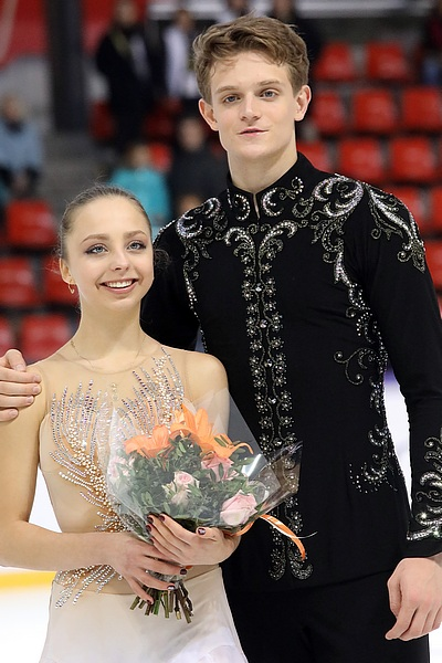 Александра Бойкова и Дмитрий Козловский на этапе Гран-при во Франции 2018